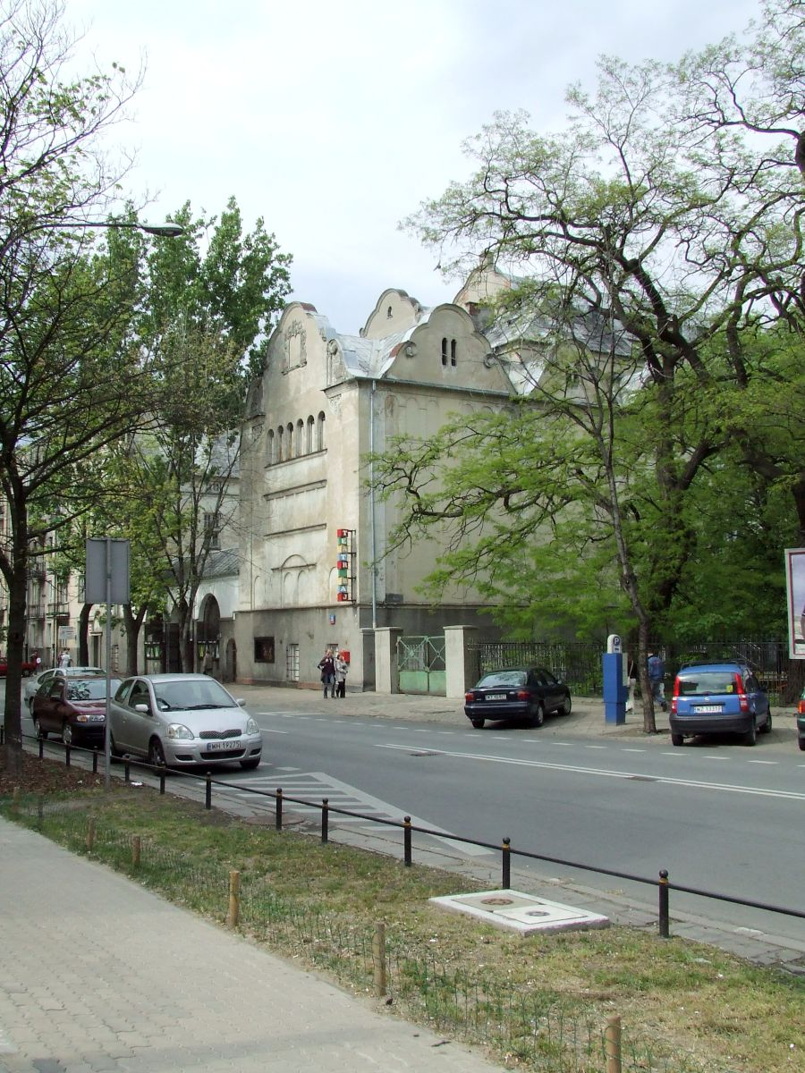 Gmach Wychowawczy Warszawskiej Gminy Starozakonnych, obecnie Teatr Lalek Baj i przedszkole